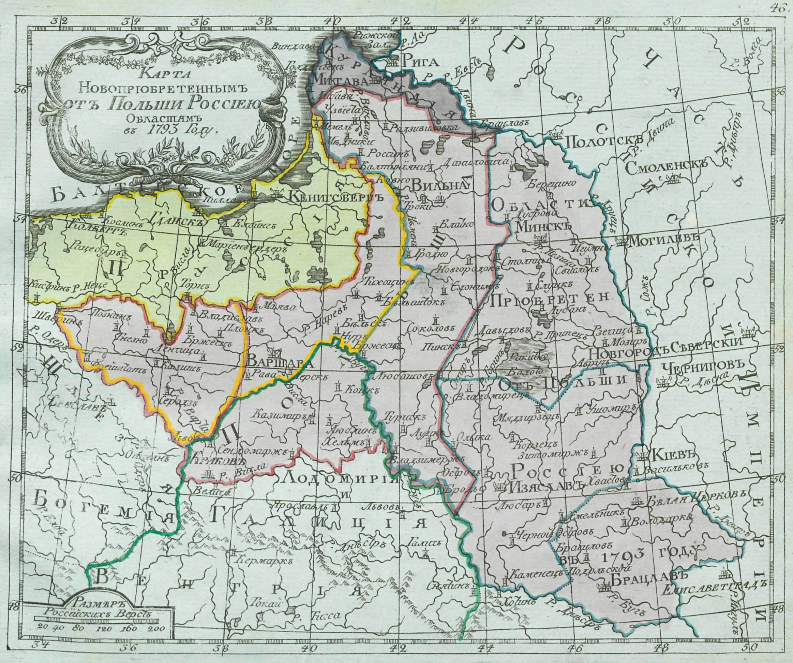 Rusijos imperijos 1793 metais įgytų terirtorijų žemėlapis